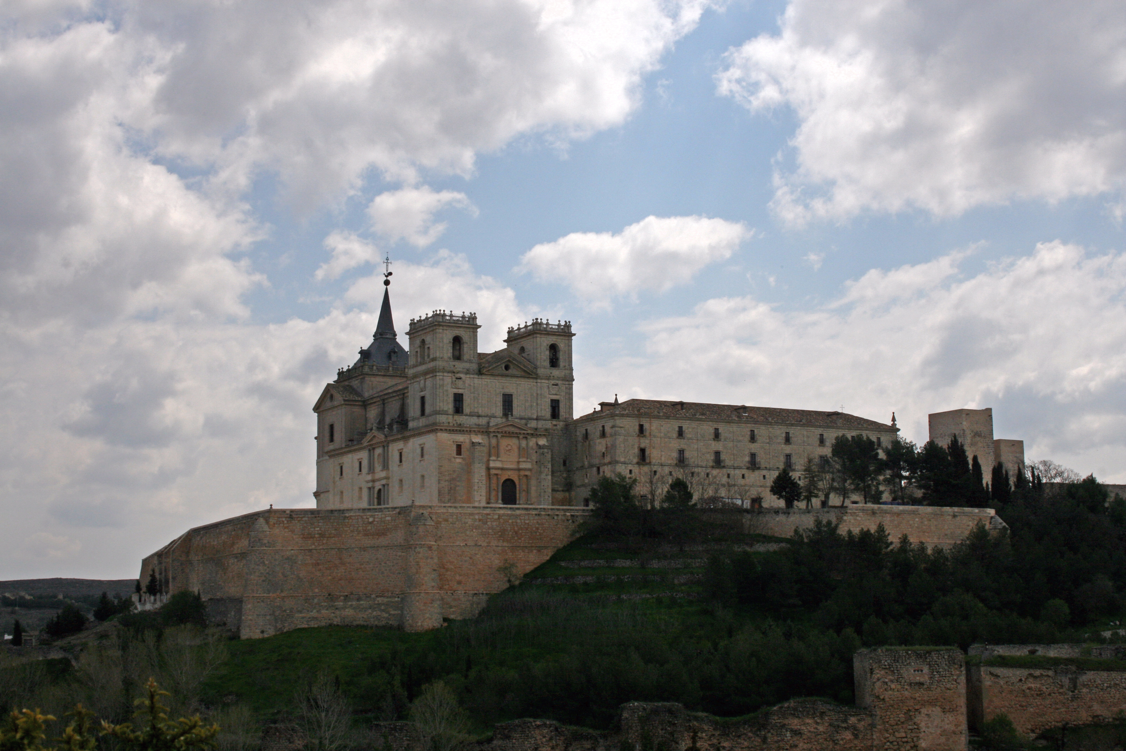 Monasterio de Uclés, Cuenca, España - Vista desde el oeste